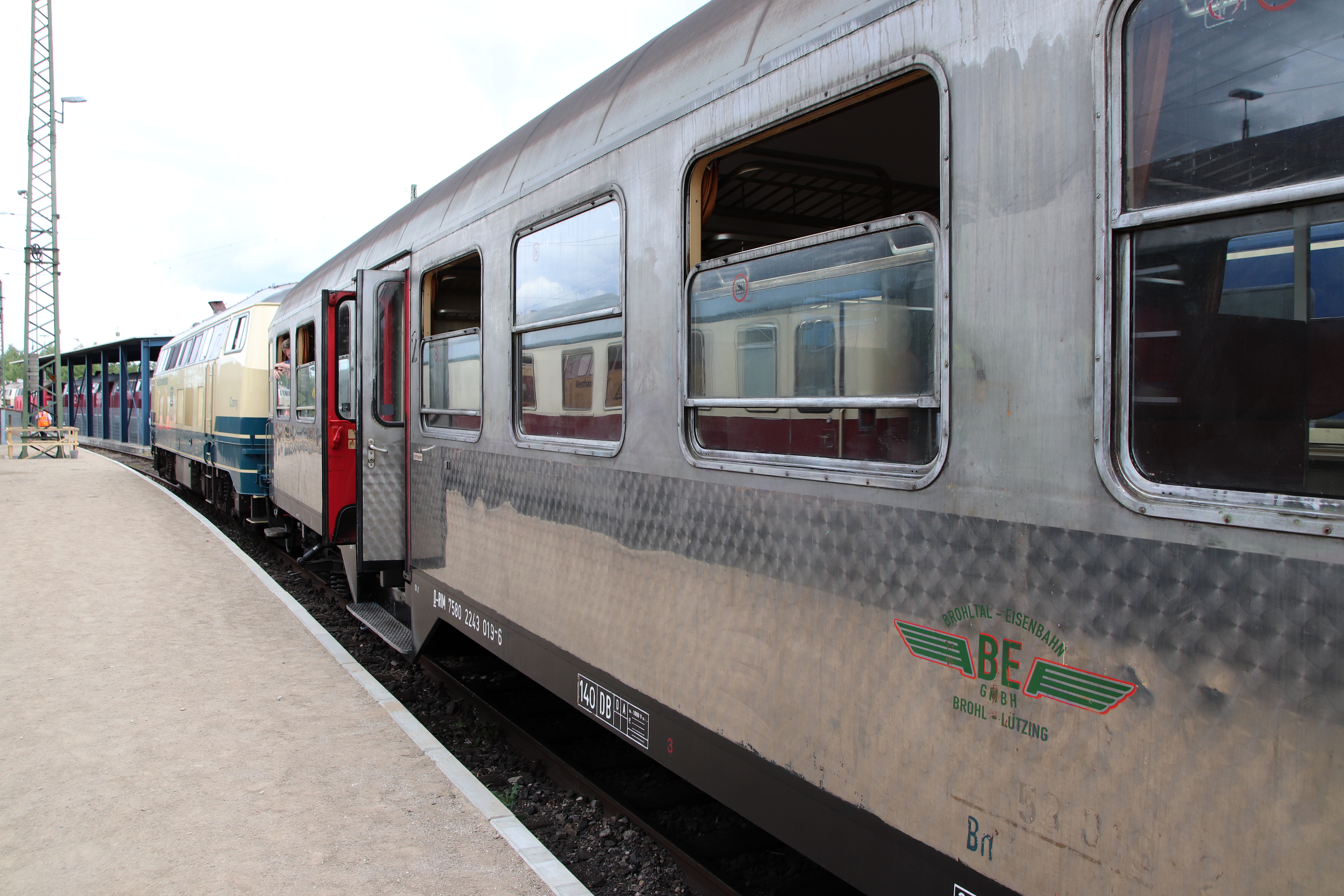 DB-Museum Koblenz-Lützel, Sommerfest 2018. 218 460-4 "Conny"